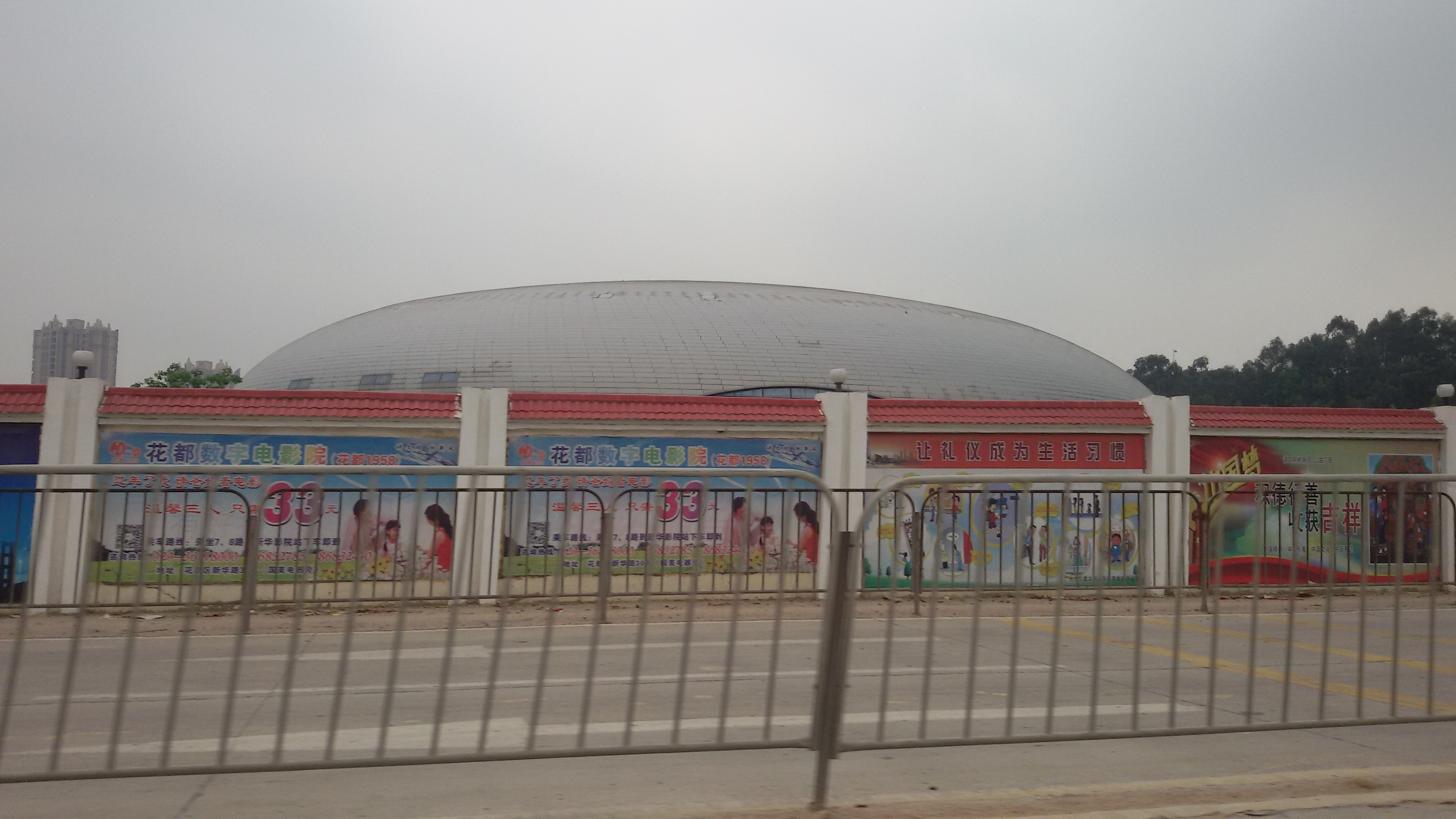 粵語: 2015年4月18號，飛鵝嶺站連同花都東風體育場一齊喺度起緊。